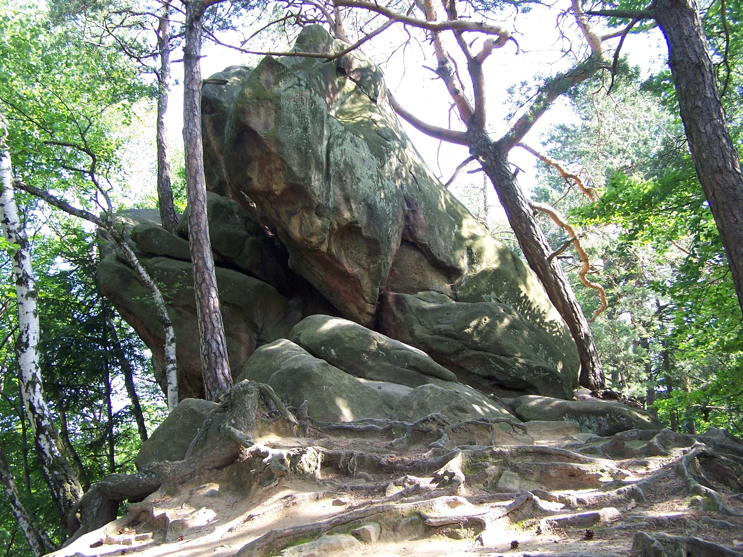 Diabli Kamień (Krzesławice)